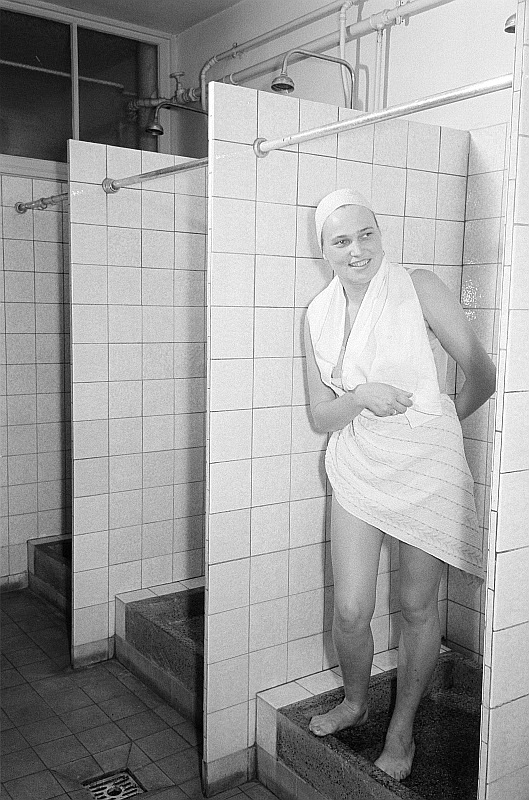 Original image description from the Deutsche Fotothek Portrait einer Frau mit Handtuch und Badehaube im Baderaum der Leipziger Volkszeitung